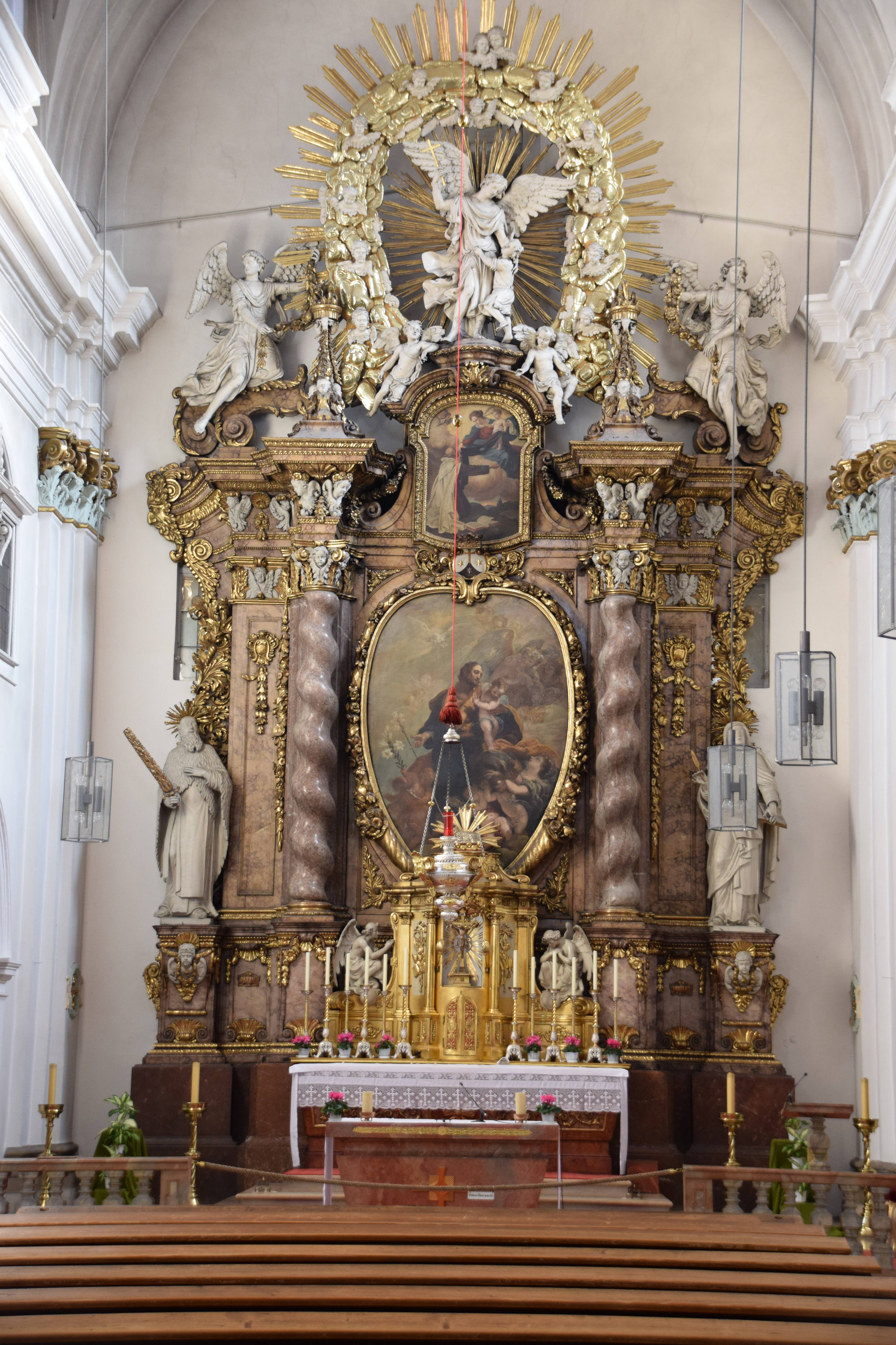 Hochaltar der Karmelitenkirche St. Josef am Alten Kornmarkt in Regensburg